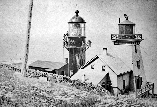 En 1907 le nouveau phare de Pointe-à-la-Renommée en construction et l'ancien de 1880.